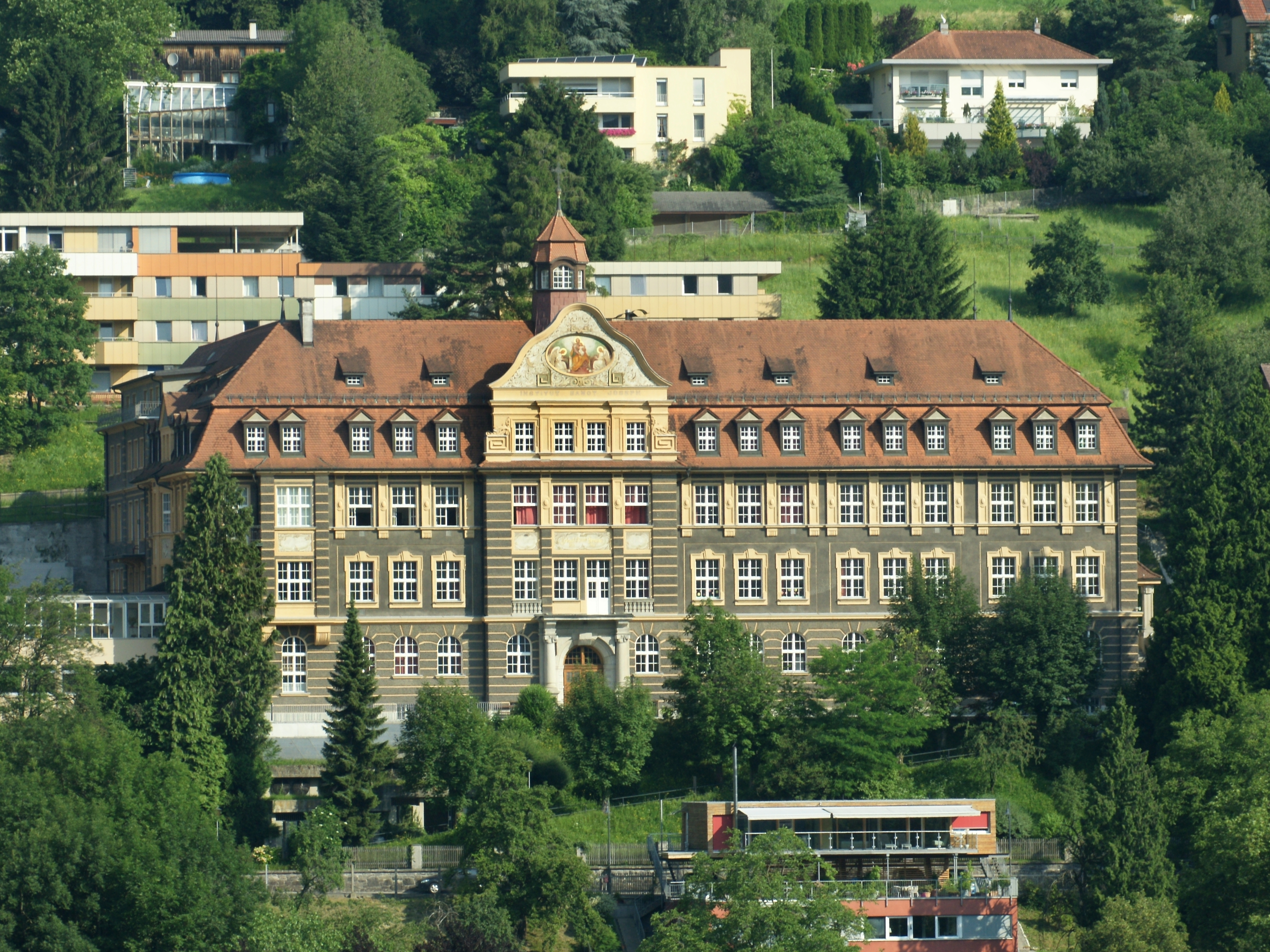 das Institut St. Josef [1] liegt am Fusse des Ardetzenberges in Feldkirch, Vorarlberg und wurde als Schule und Internat in den Jahren 1910/11 erbaut. Blick von der Schattenburg